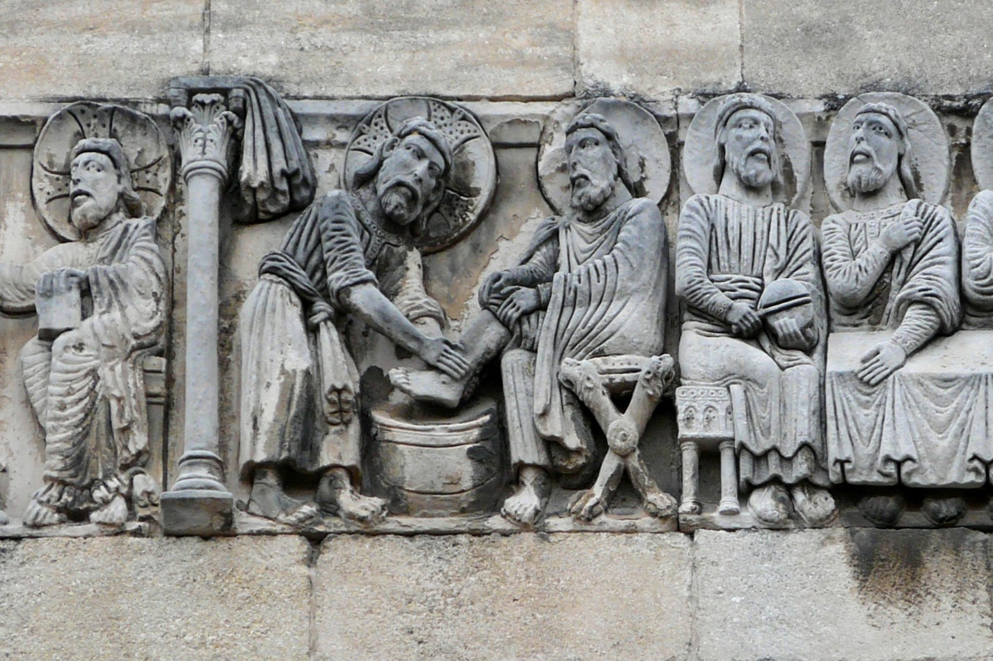 bas relief de la collégiale Notre-Dame des Pommiers à Beaucaire (Gard, France).